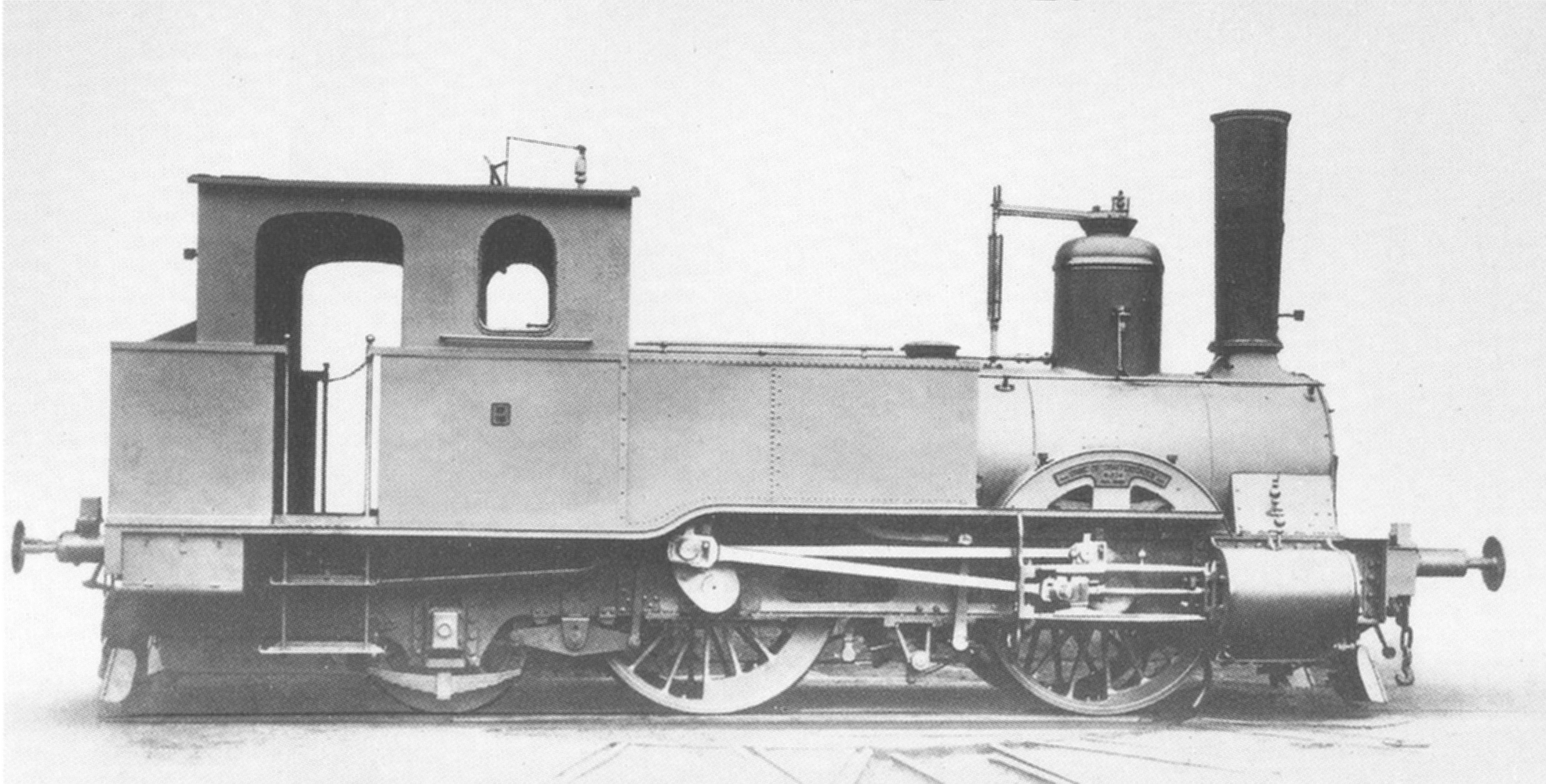 Dampflokomotive Badische IV a.